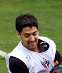 Jogador Adrián González, treinamento do São Paulo Futebol Clube em 2009.